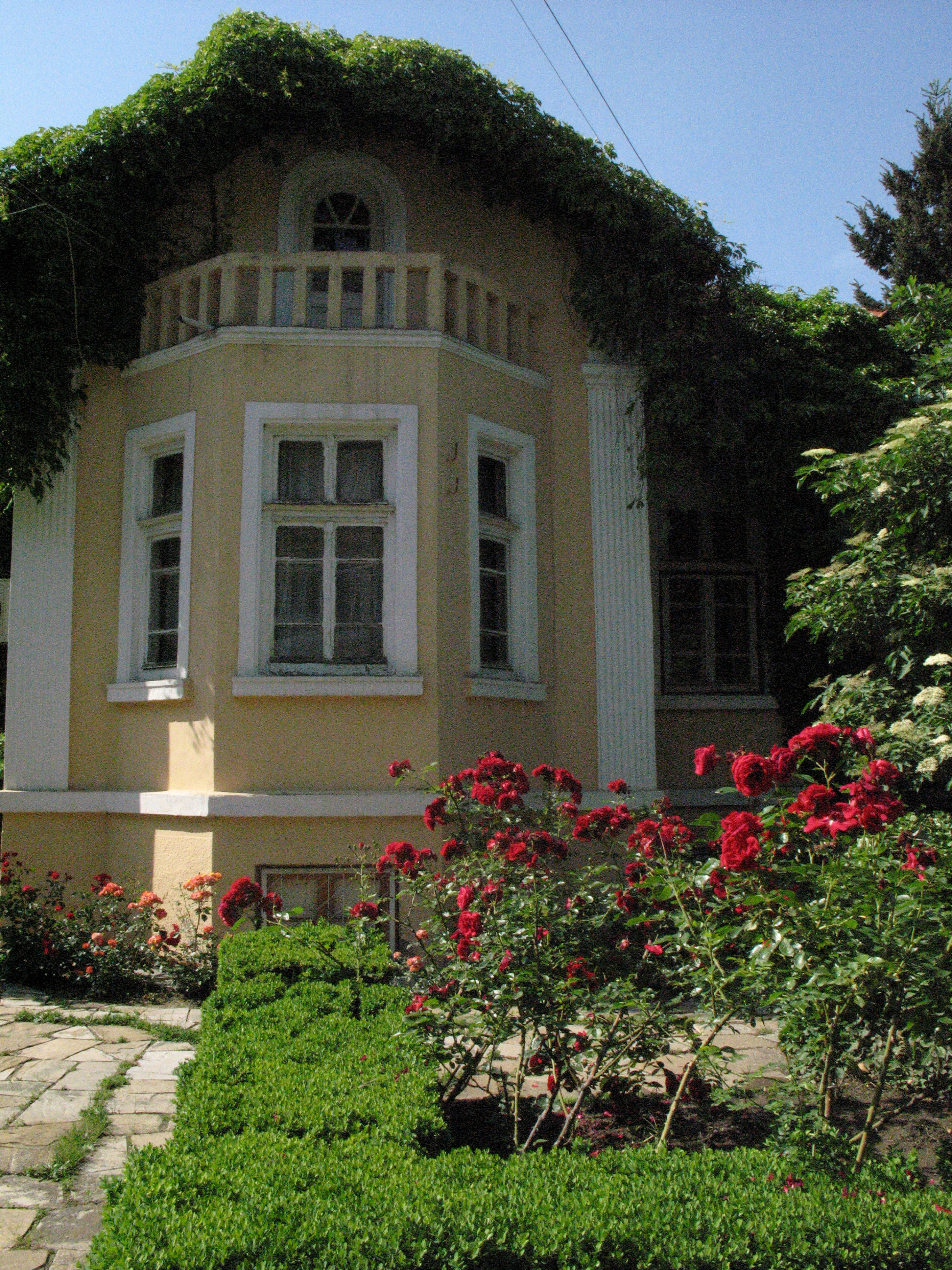 „Литературно-художествен музей "Чудомир", Казанлък“